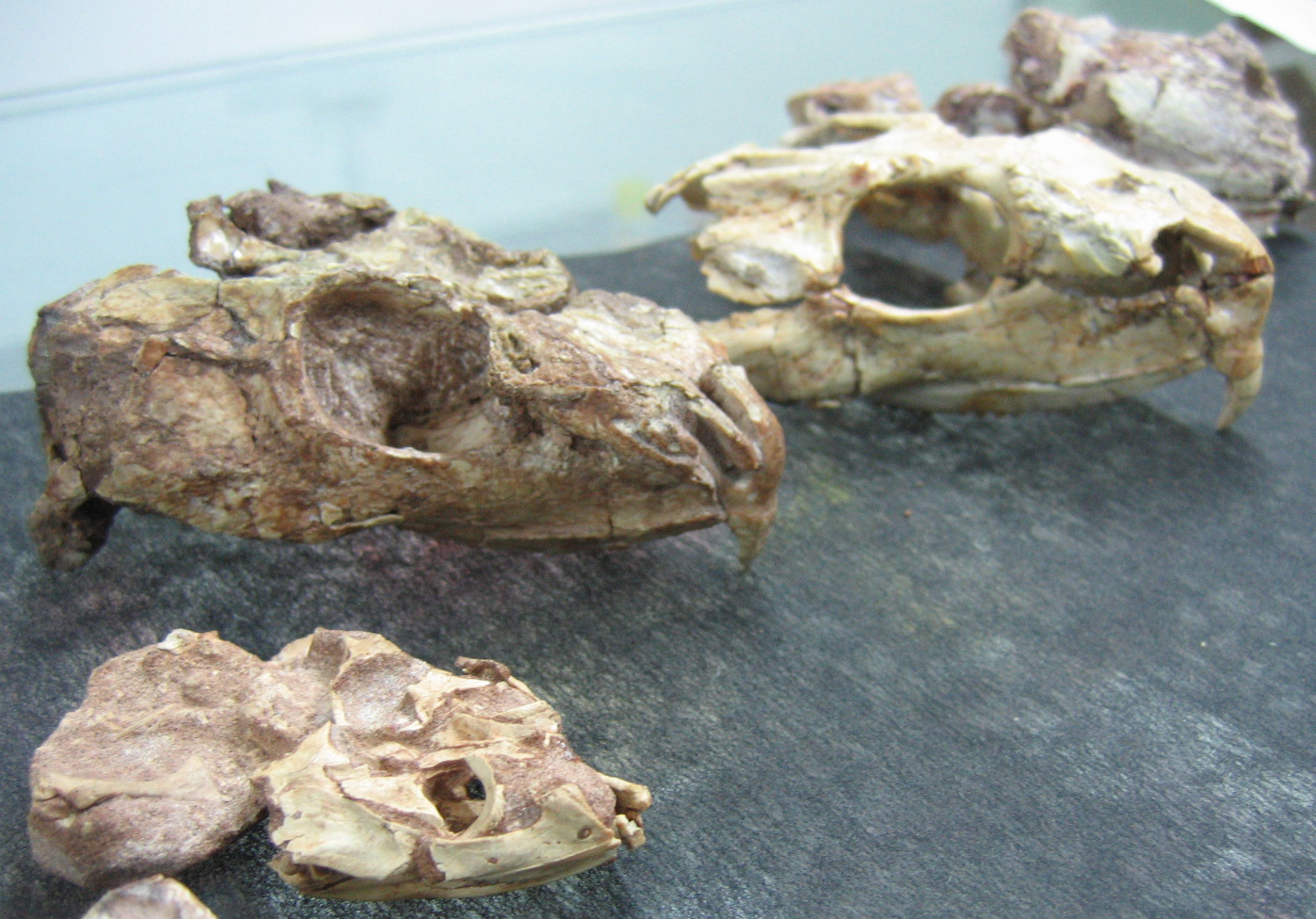 Cráneos de Priosphenodon avelasi correspondiendo a distintos estadíos ontogenéticos